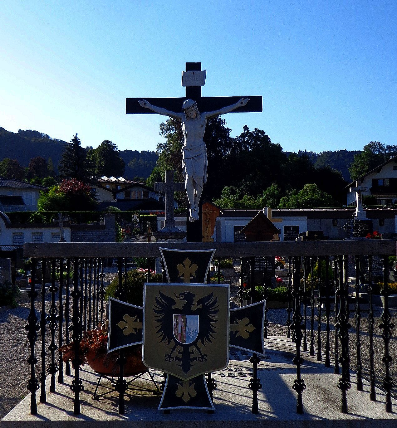 Friedhof Altmünster - Grab des Erzherzogs Maximilian Joseph von Österreich-Este (* 1782 in Mailand; † 1863 auf Schloss Ebenzweier in Altmünster)